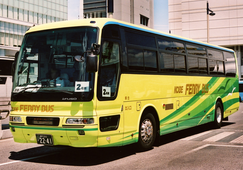 神戸フェリーバス 神戸フットバス 三菱ふそう・エアロバス PJ-MS86JP